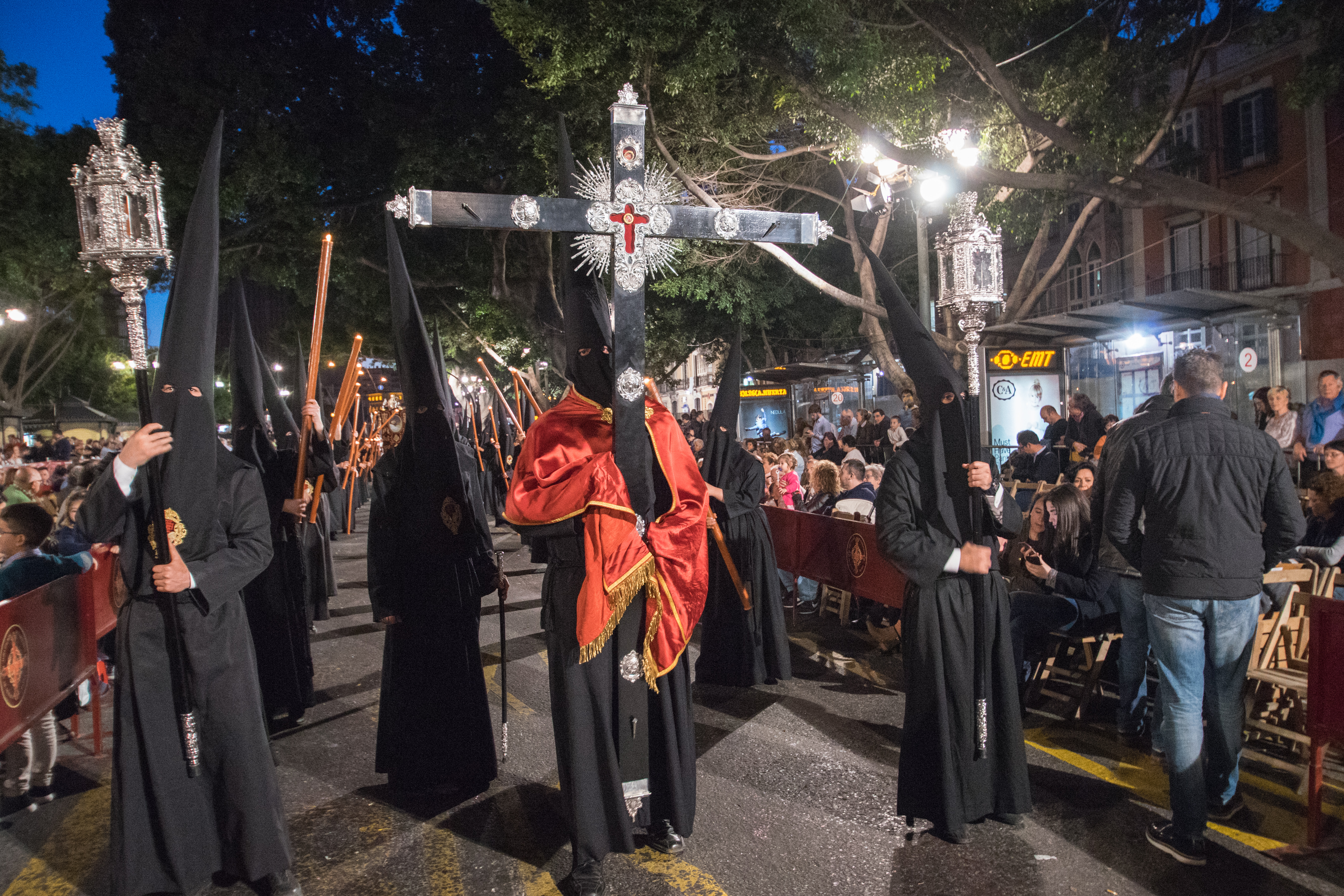 Cruz Guía de la Muy Antigua y Venerable Hermandad del Santo Cristo del Calvario y Vía Crucis y Cofradía de Nazarenos del Santísimo Cristo Yacente de la Paz y de la Unidad en el Misterio de su Sagrada Mortaja, Nuestra Señora de Fé y Consuelo, Santa María del Monte Calvario y San Francisco de Paula This is a photography of a Folklore festival in Spain (Wikidata id Q9075883).